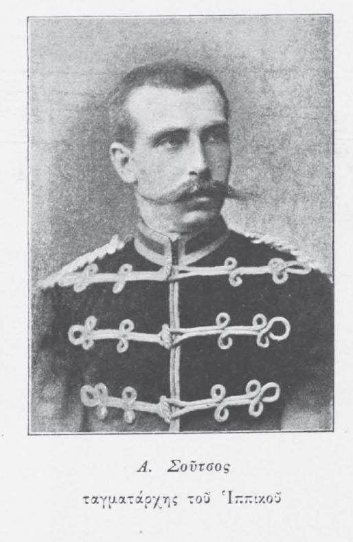 griechischer Militär, 19. Jahrhundert